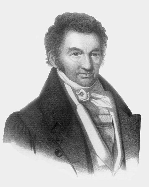 Heinroth, Johann Christian August (1773 - 1843). Ab 1811 Professor für psychische Therapie in Leipzig. Brustbild nach einer Lithographie von Carl Wilhelm Lutherer (1807-1851), ca. 210 x 170 mm um 1811. ca. 1835, Ausschnitt und Bearbeitung mit Photoshop für Wikiversity 5. Juni 2009. Inhaltlich wurde das Porträt nicht verändert.